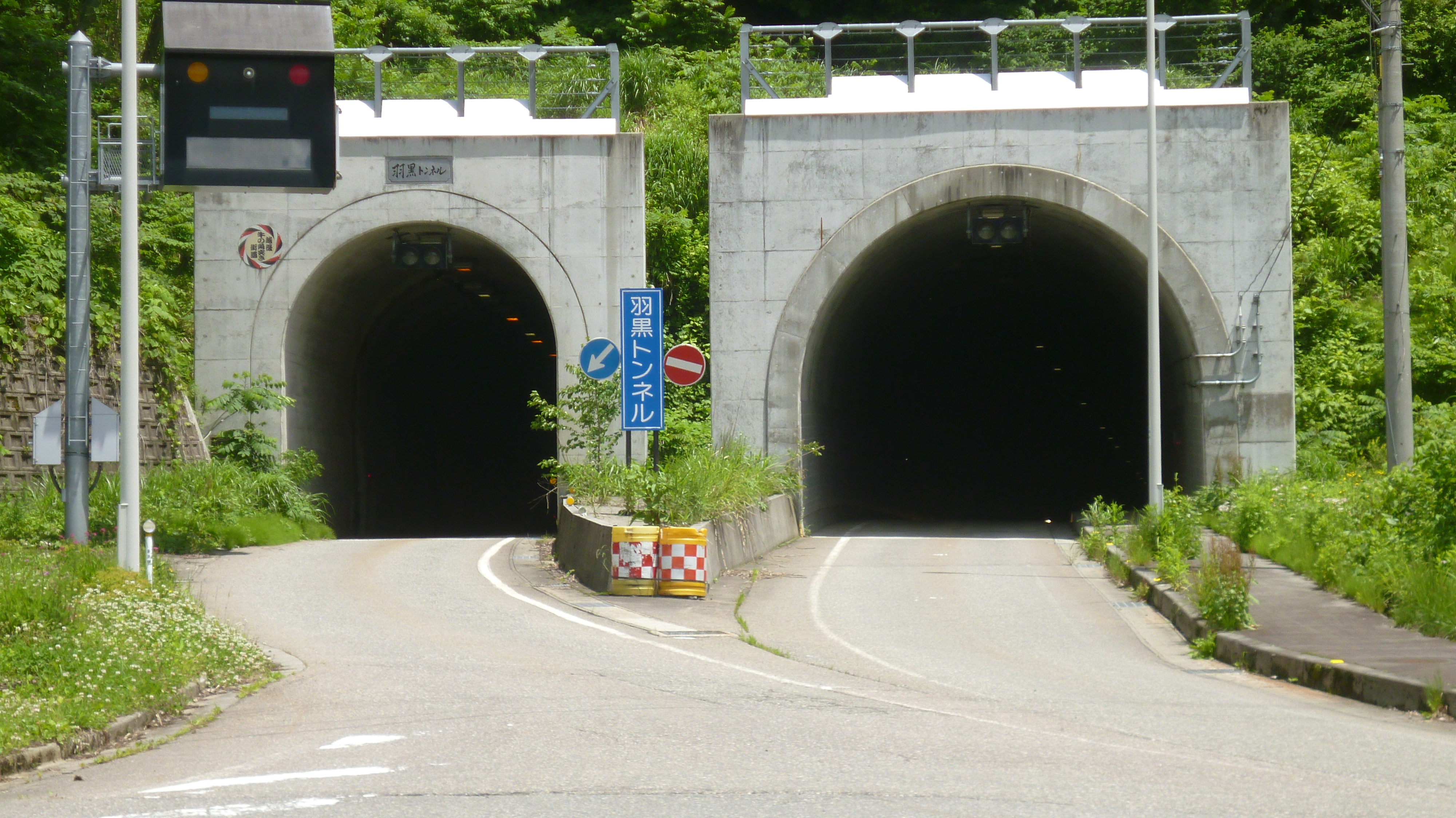 新潟県道23号柏崎高浜堀之内線の羽黒トンネル西端の写真。